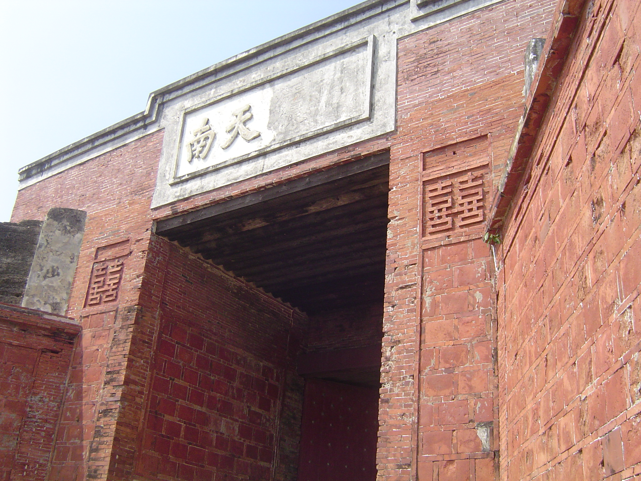 中文（台灣）: 修復前的高雄市旗後砲臺威震天南門額。